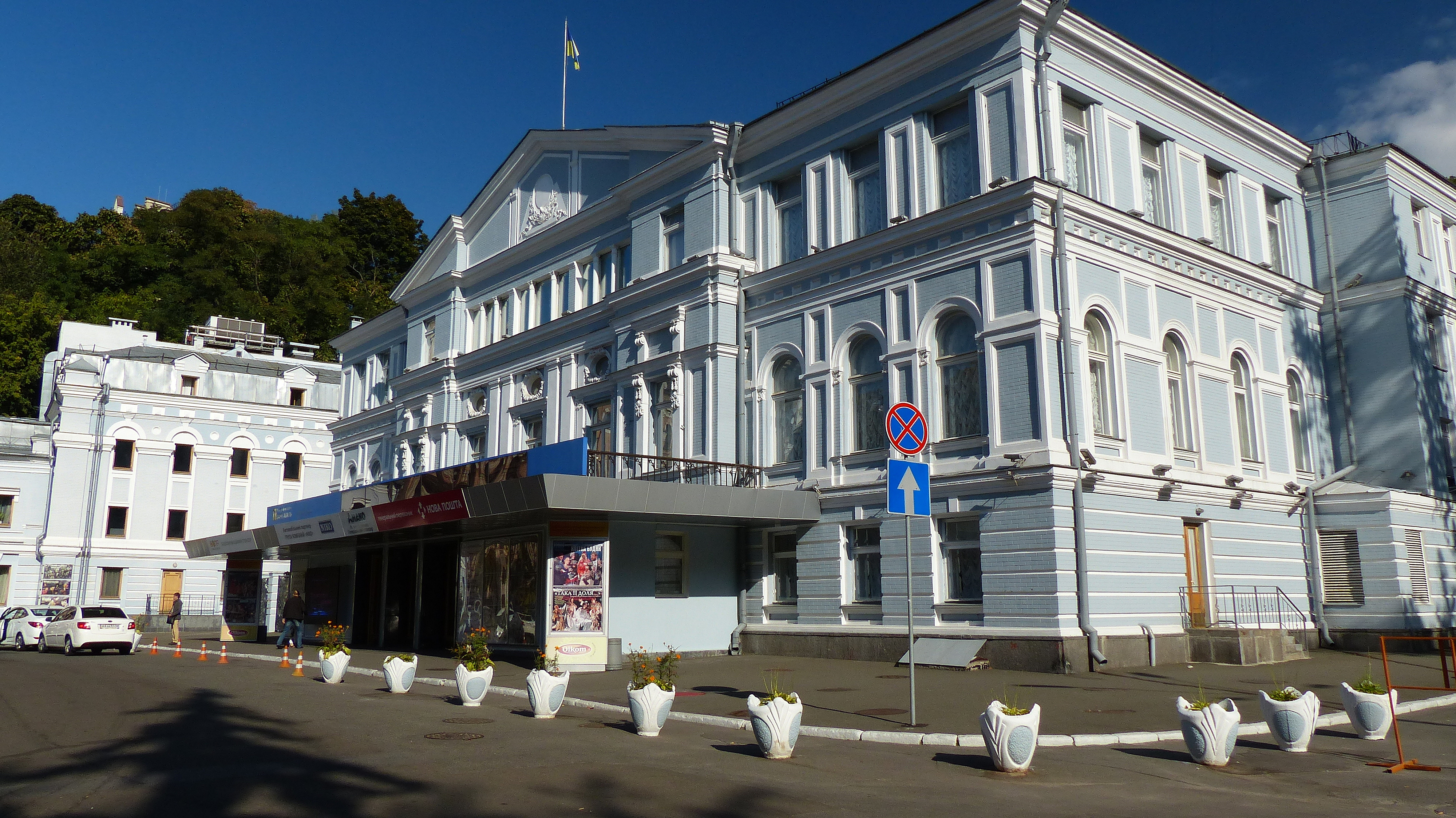 Театр міський драматичний Соловцова, Київ, Франка Івана пл., 3